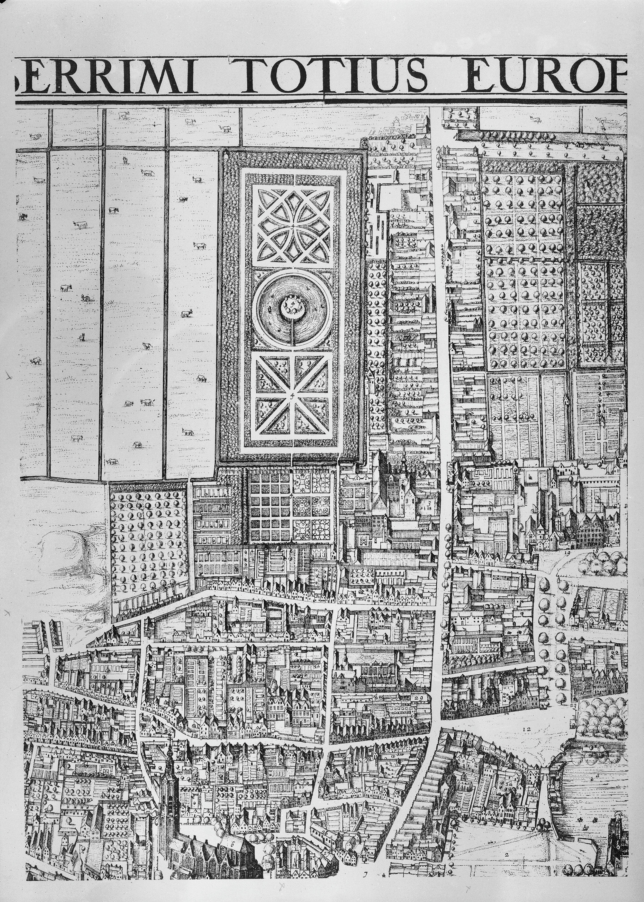 Plattegronden en overzichten: oude kaart. Detail van een grotere kaart.